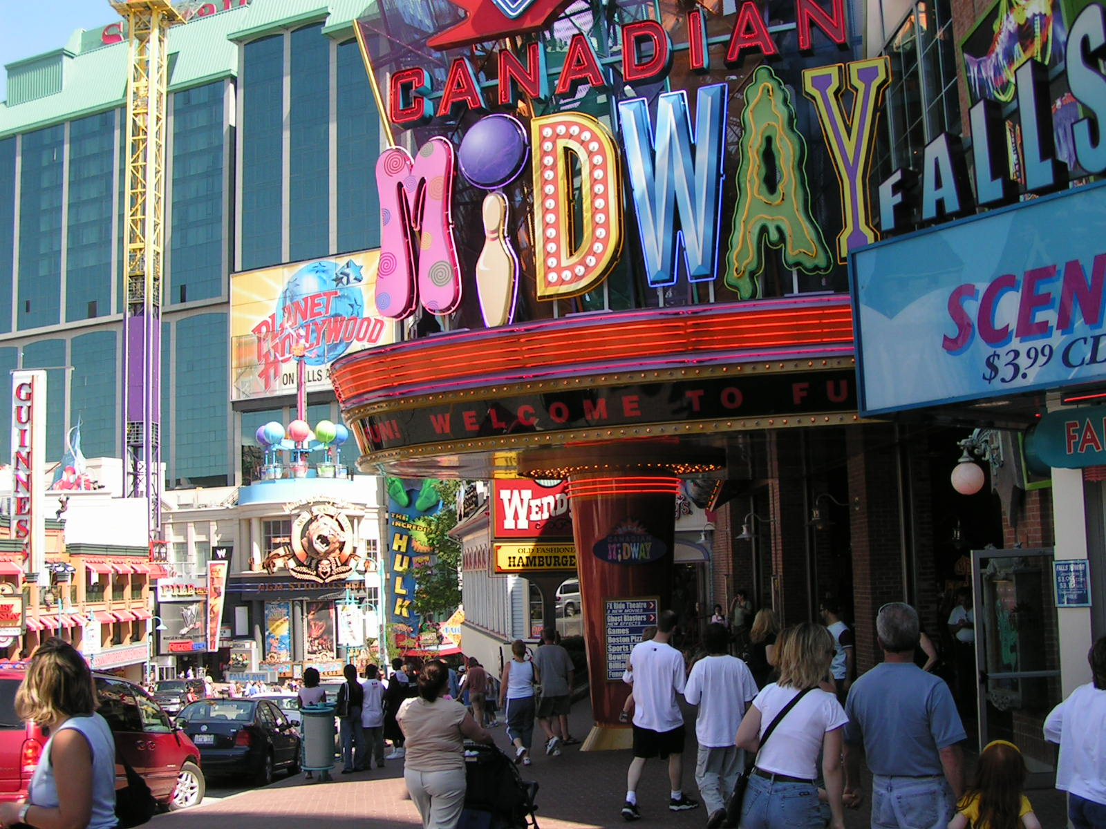 Photo de Clifton Hill, une attraction de Niagara Falls, Ontario, Canada